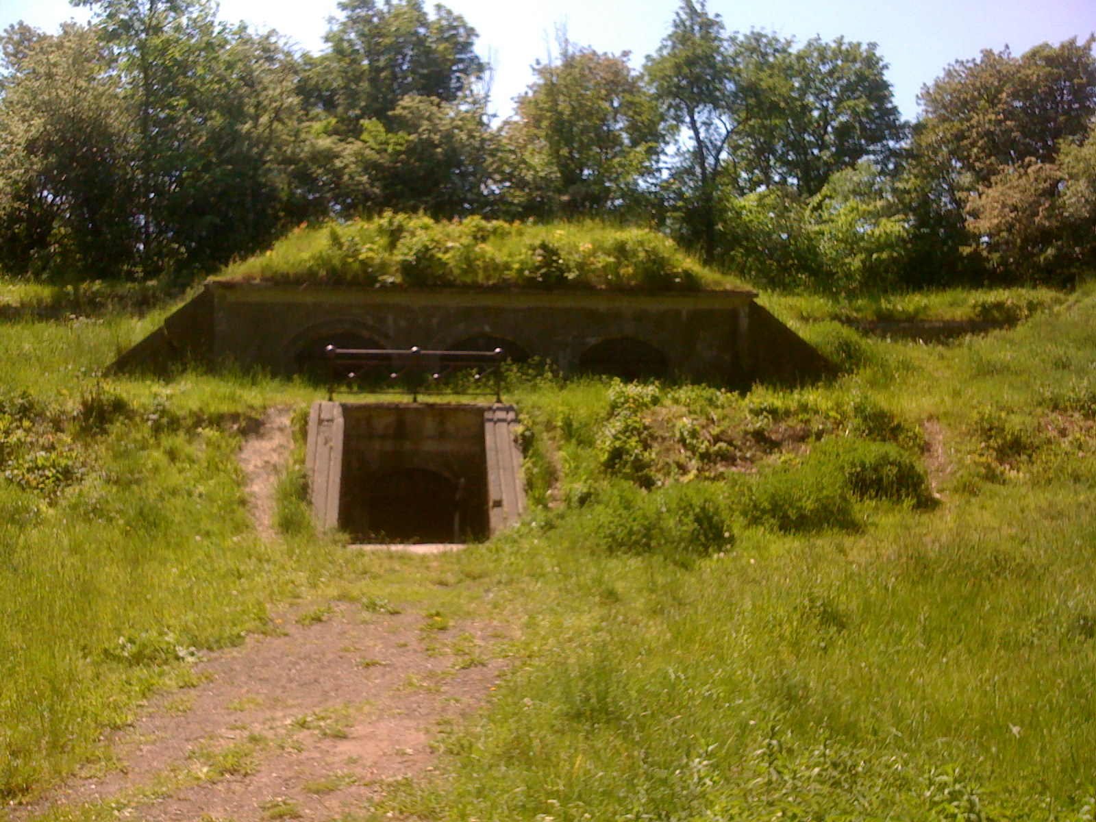 Et af de krudtmagasin er, som blev bygget i forbindelse med de permanente batterier på Vestvolden, som er en del af Københavns befæstning. Dette magasin er en del af Paradis Batteri på voldlinje II-III, lidt nord for S-banen (linje A+E) nord for Gl. Køge Landevej.